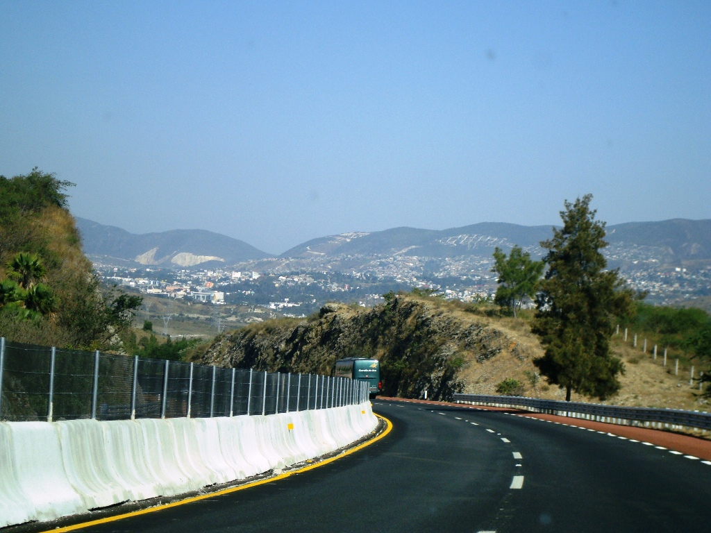 La ciudad de Chilpancingo de los Bravo, Guerrero desde la Autopista del Sol.